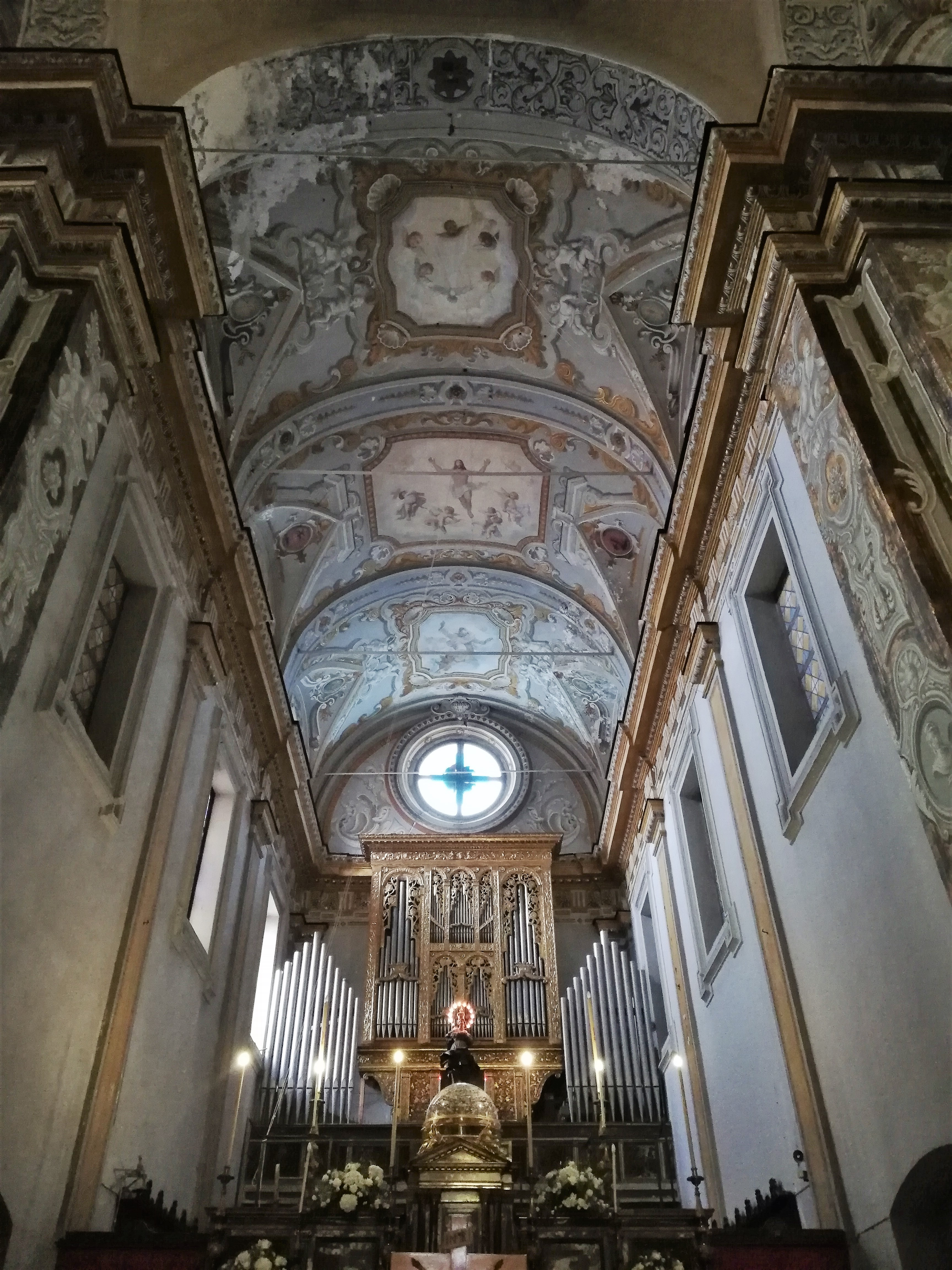 Volta abside